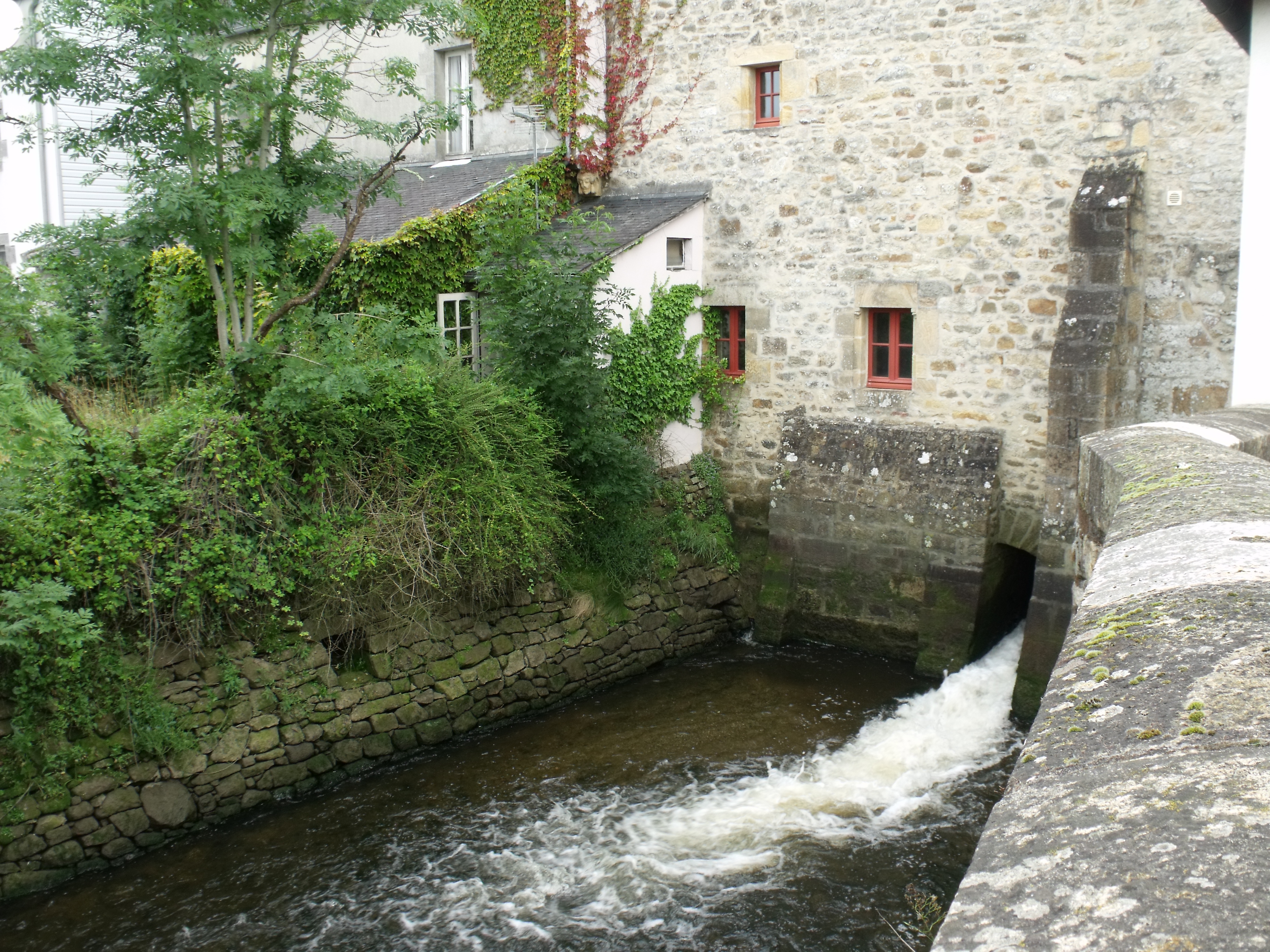 Daoulas